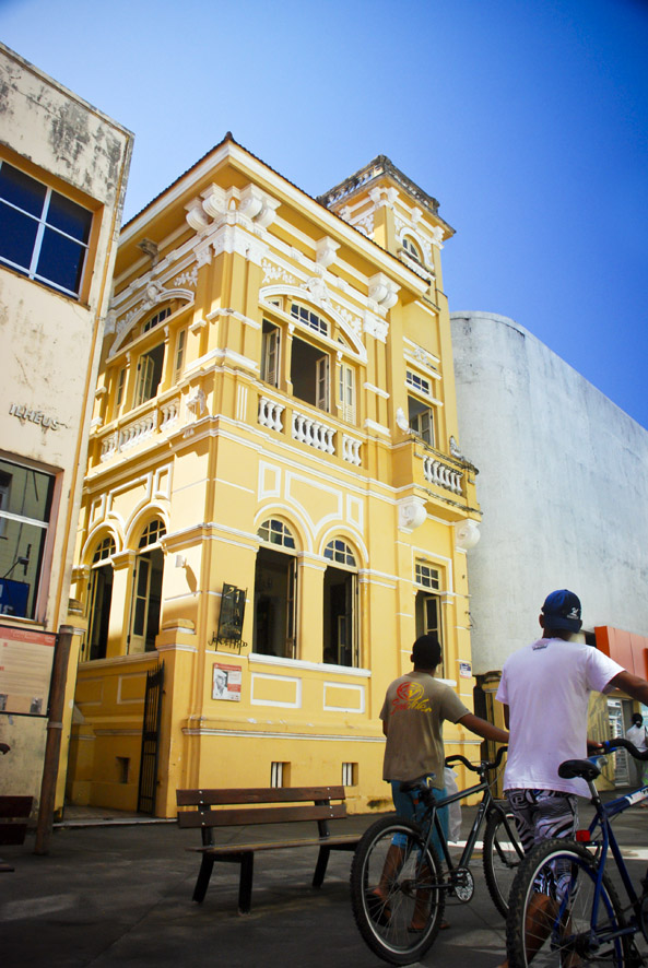 2012_06_28 Fest Choc Ilhéus - Casa de Jorge Amado - Foto João Ramos - Bahiatursa 12